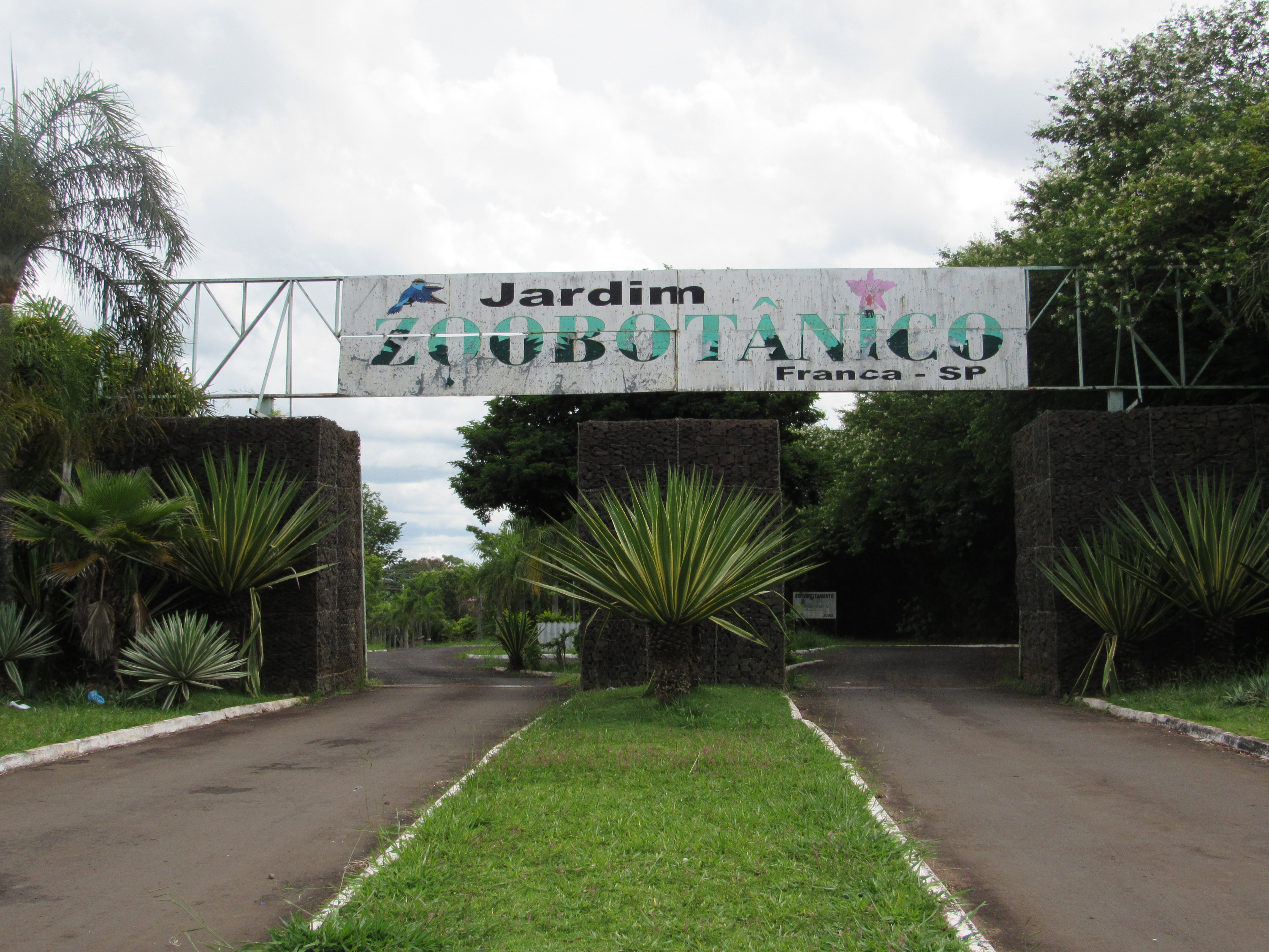 Jardim Zoobotanico de Franca (entrada)